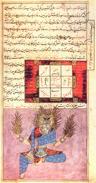 Nujum-ul-Ulum